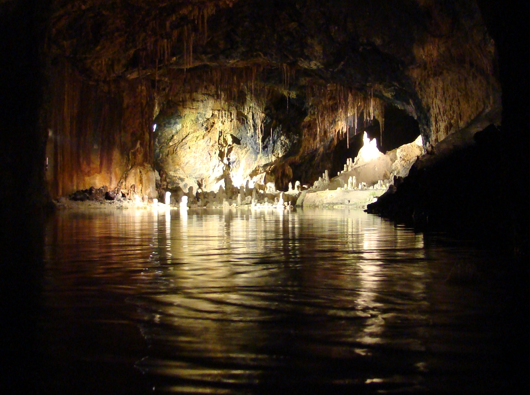 Saalfelder Feengrotte